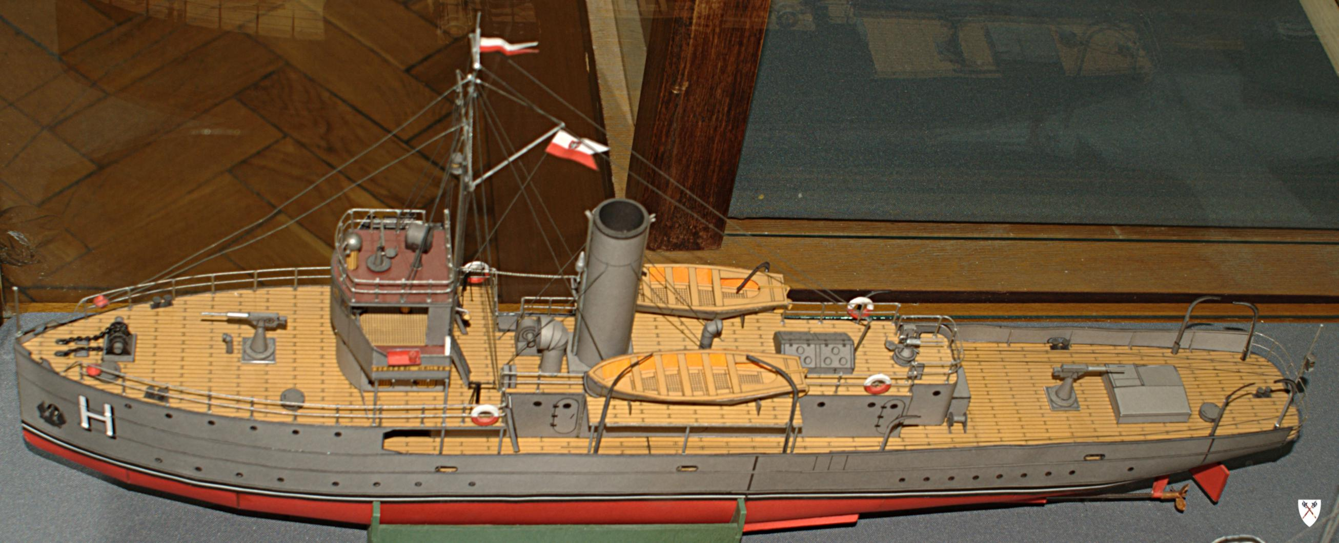 Model ORP Generał Haller w Pomorskim Muzeum Wojskowym.